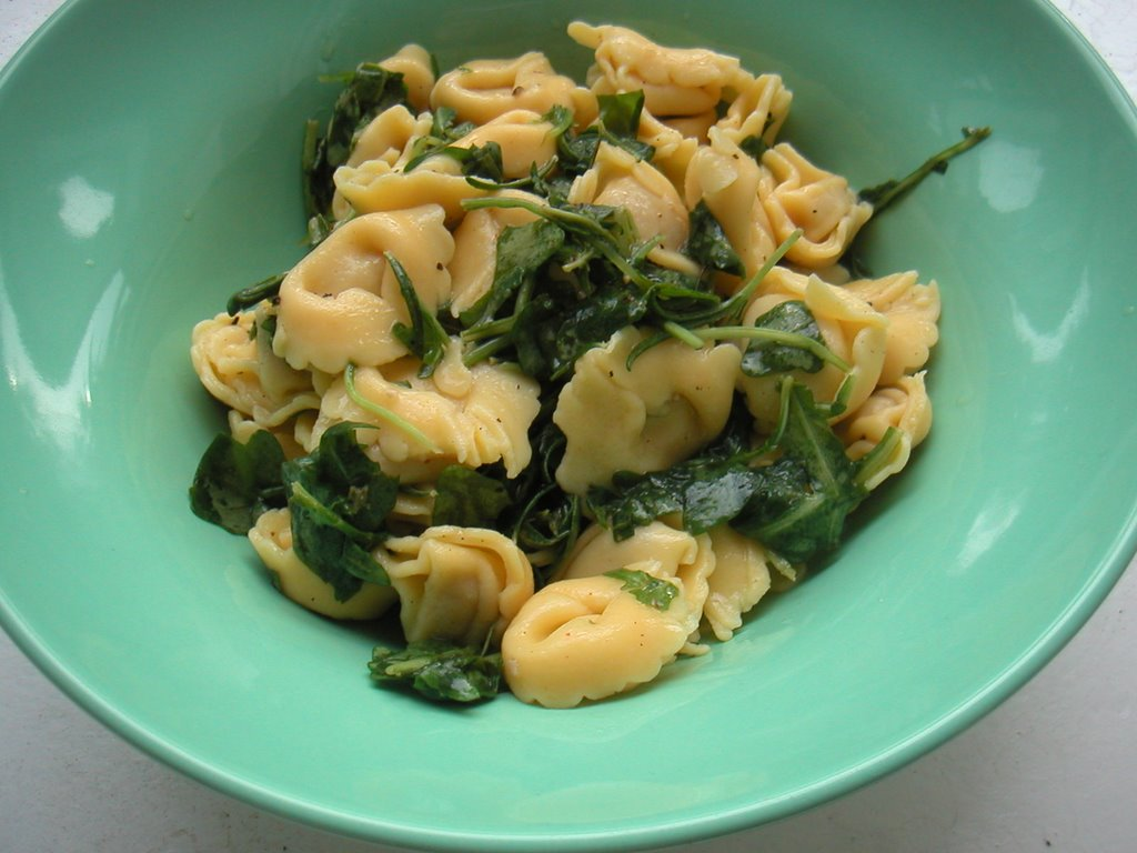 Tortellini med rucola og citronsaft